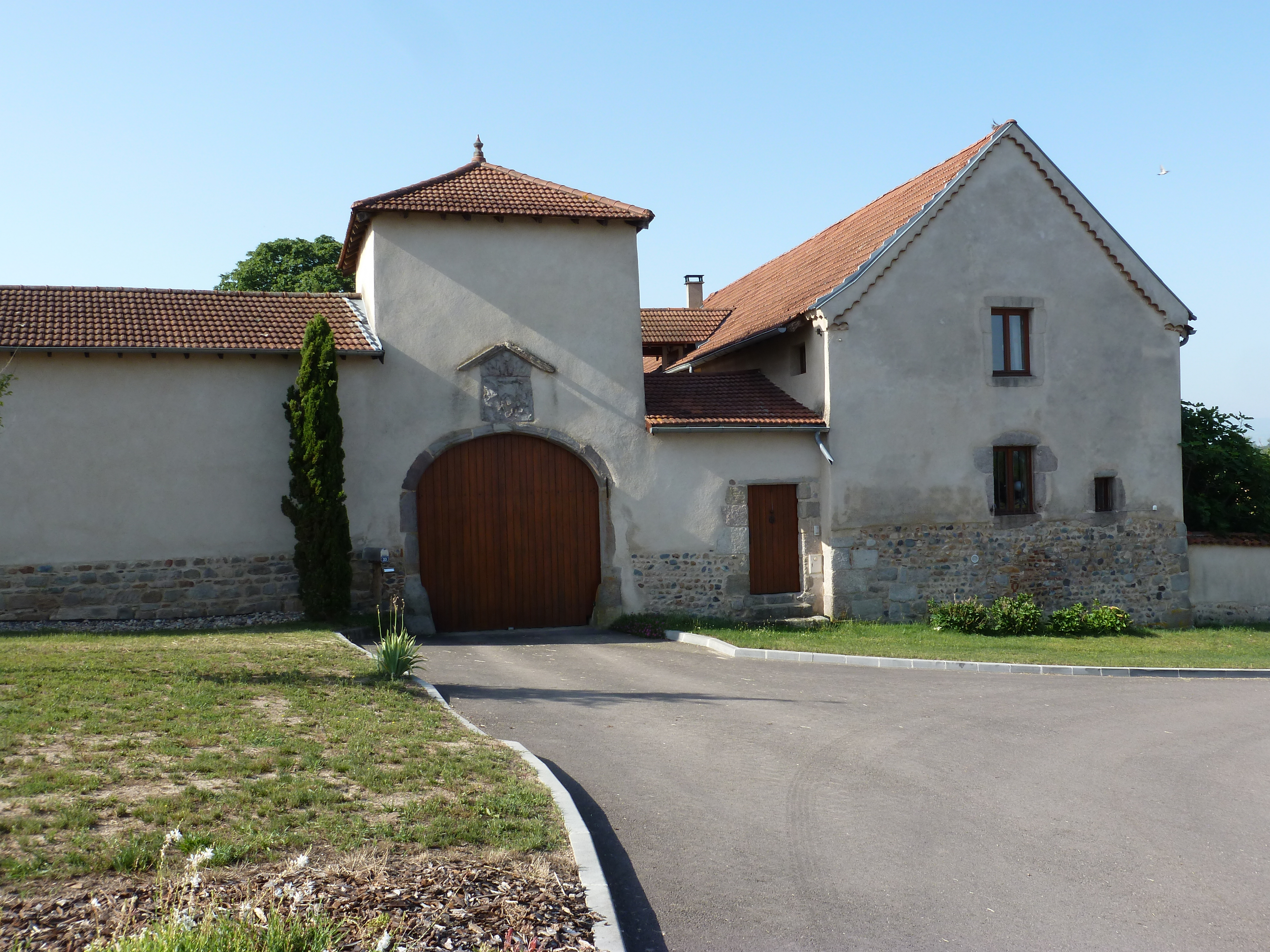 Maisonfort actuellement. L'écusson au dessus de la porte et celui des Coignet qui construisirent ce pigeonner porche qui donnait accès à la Maisonfort